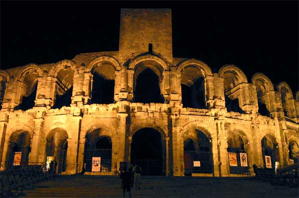 Arles Arena (Original text : Arles Arena (Amphitheatre) Nordseite)